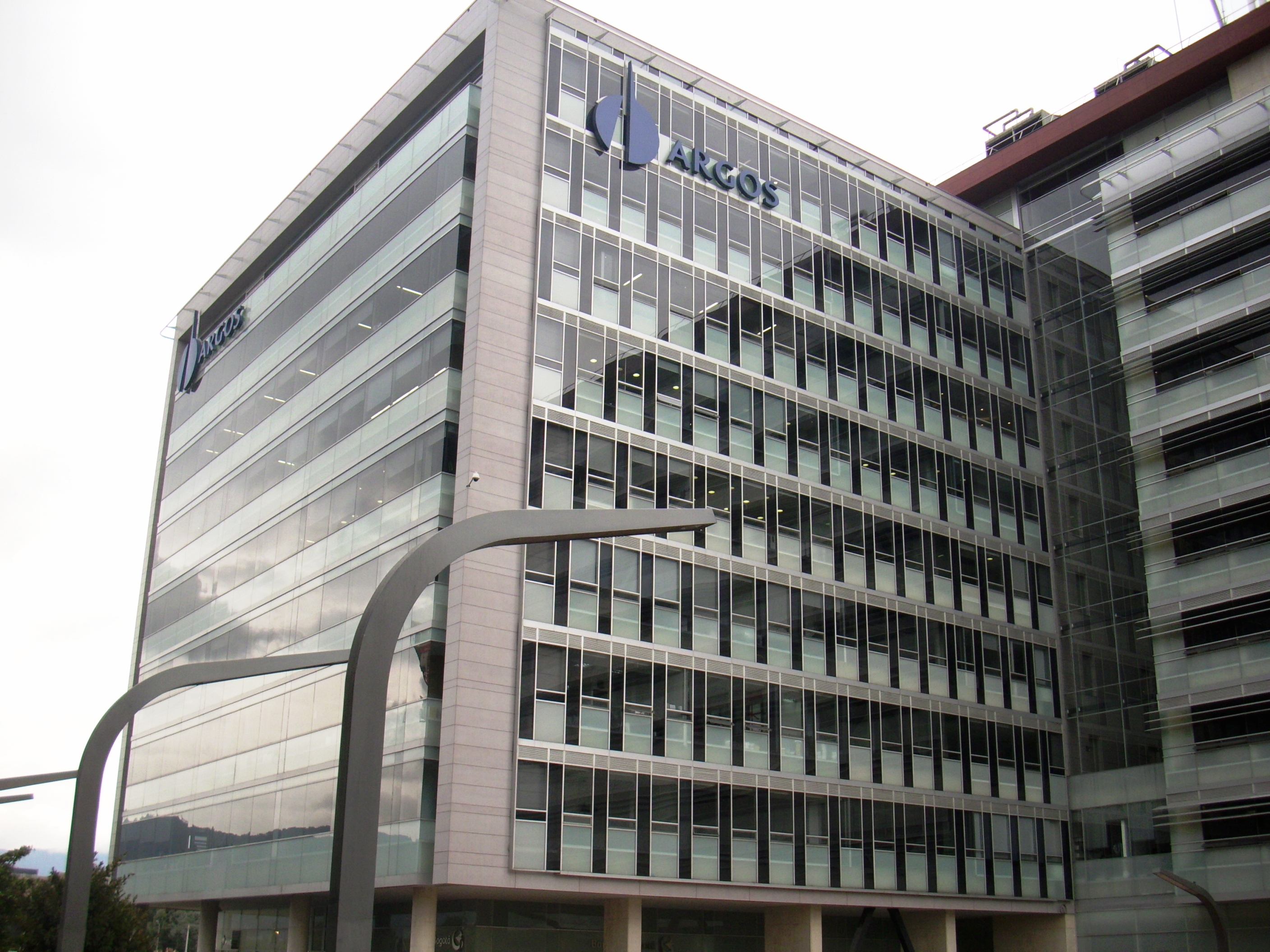 Torre Argos de la Ciudad Empresarial Sarmiento Angulo.